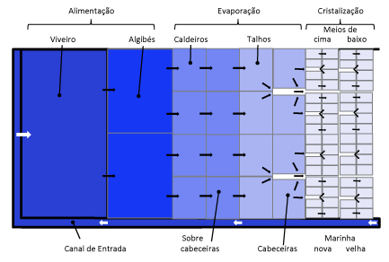 Esquema de funcionamento de uma salina tradicional, no exemplo foi utilizada uma salina de Aveiro, a mais antiga de Portugal, com registos desde o Séc. VIII